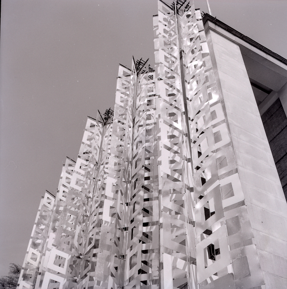 Milano. X Triennale. Decorazione applicata sulla facciata del Palazzo dell'Arte in occasione della decima edizione. Servizio fotografico : Milano, 1954 / Paolo Monti. - Buste: 4, Fototipi: 4 : Negativo b/n, gelatina bromuro d'argento/ pellicola ; 6x6. - ((Serie costituita da 4 negativi identificati con i nn.: 23805-23808. La suddetta serie è contenuta nella scatola identificata con la numerazione 20799-21085. La suddetta serie è contenuta nella scatola identificata con la numerazione 23214/23808. Sulla scatola manoscritto con pennarello nero: "Design e arte moderna". - Occasione: Documentazione della X Triennale del 1954, intitolata "Prefabbricazione - Industrial Design: Esposizione Internazionale delle Arti Decorative e Industriali Moderne e dell'Architettura Moderna". L'esposizione si tenne presso il Palazzo dell'Arte. - Fonte: Fattura di Paolo Monti: IV . Commesse/ Fattura n. 32/ Fotografie d'archivio per volume sulla Triennale di Milano (1977/11/28), presso Archivio Paolo Monti. n. 15 fotografie decime Triennale di Milano 1954